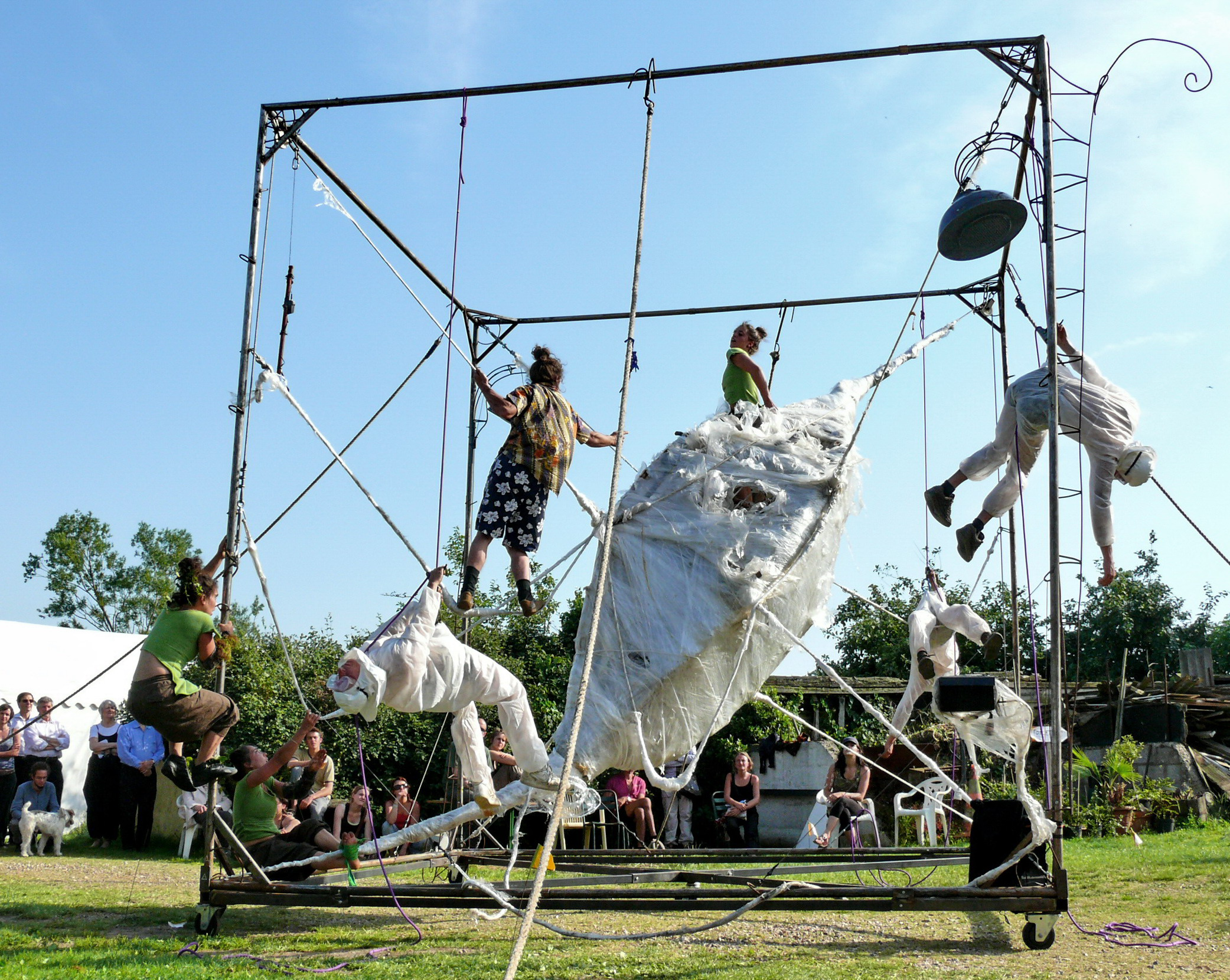 La compagnie Osemonde présente son Spectacle de NU Voyage dans les univers de la nature et de l’urbanisme lors du festival Essertival à Lavacquerie le 15 juillet 2007 (organisation : association Les Esserres)